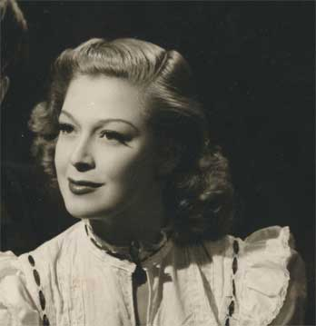 Malú Gatíca - Retrato familia. María de la Luz Gatica Boisier (Malú Gatica), nació en Purén un día 15 de enero de 1922, en la casona Boisier del predio El Fortín, de la familia de José Boisier Bourgeaux, destacado colono francés, abuelo de la actriz